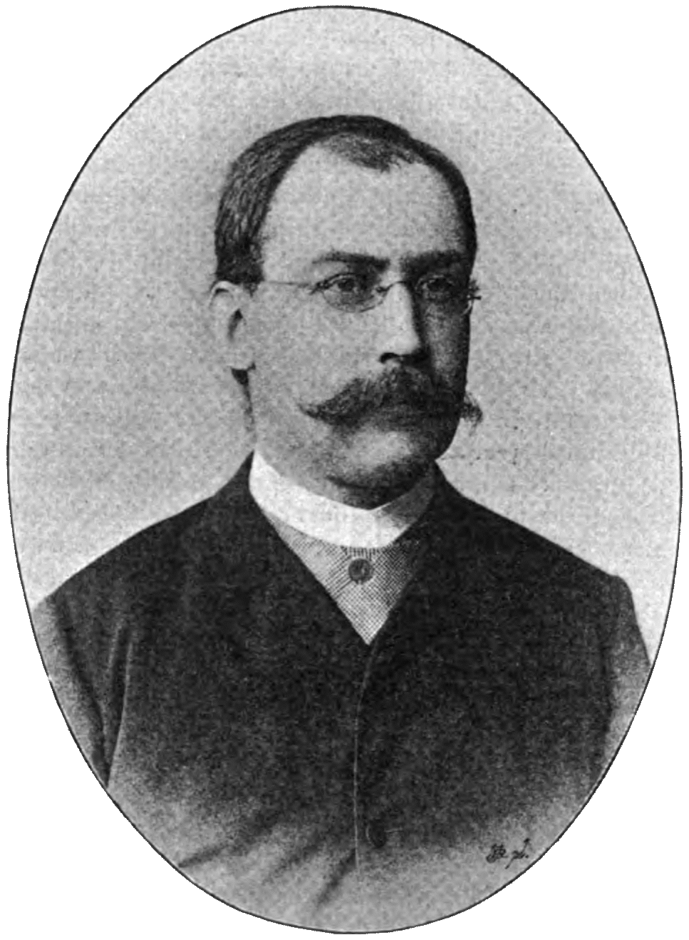 Adolf Ritter von Liebenberg (1851-1922), Austrian agronomist (plant breeder)